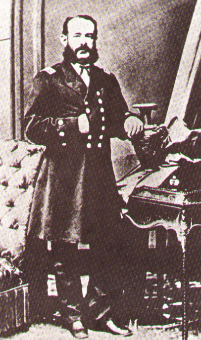 Capitán de Navío AP Miguel Grau Seminario